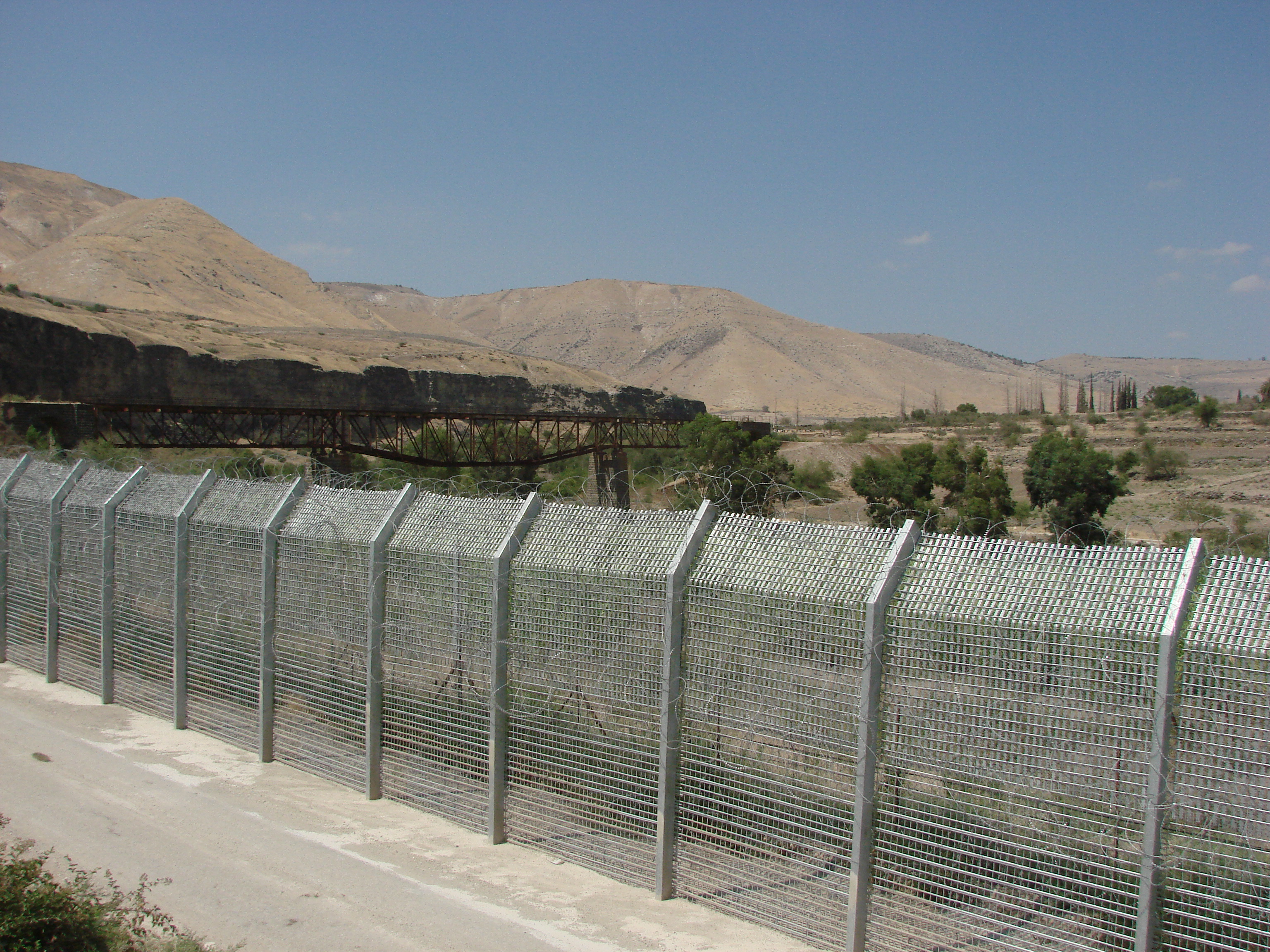 ג'יסר אום בטמה מעל הירמוך - אל חמה